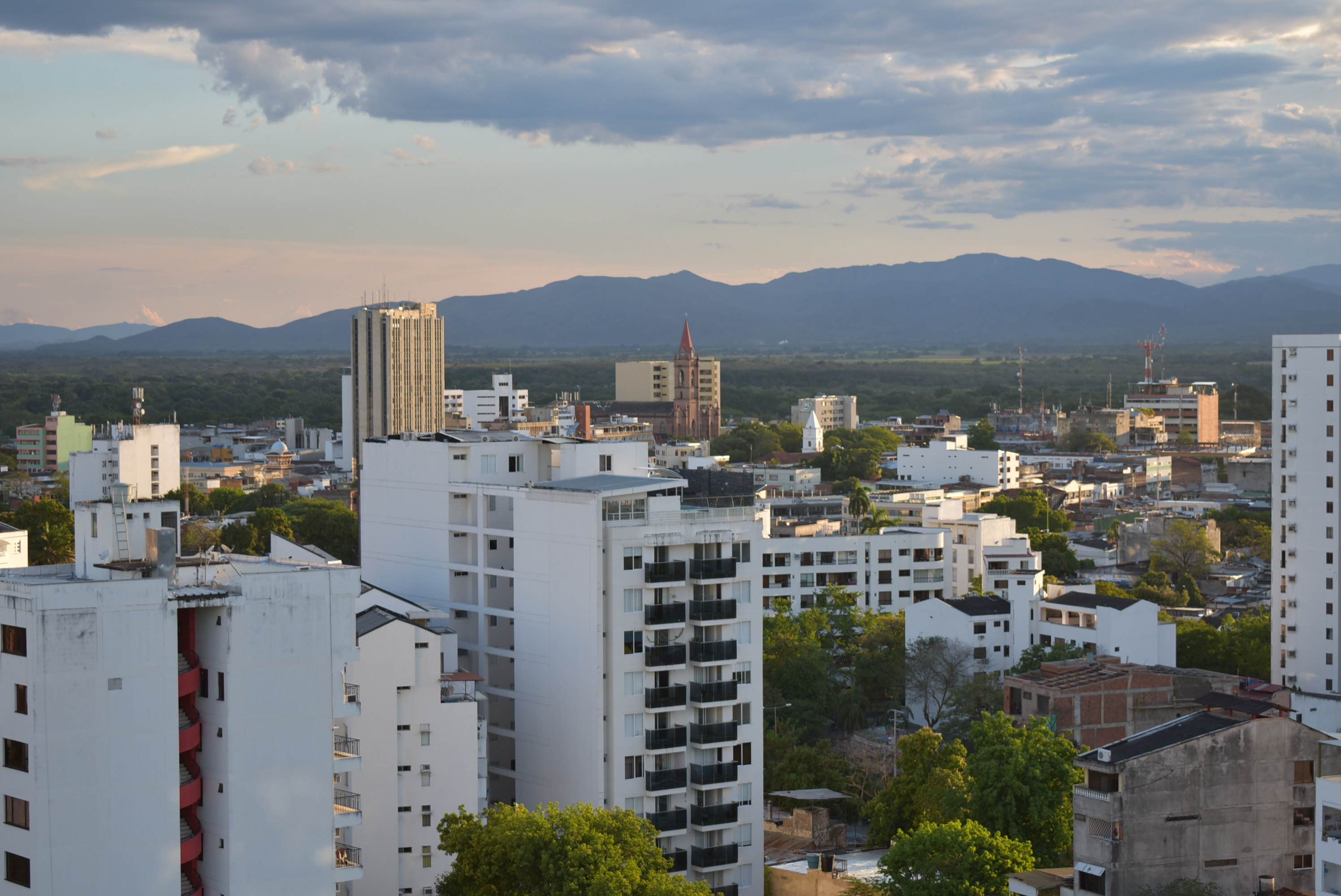 Neiva desde un edificio icónico de la ciudad, desde un piso 13 se aprecia el centro y su Skyline